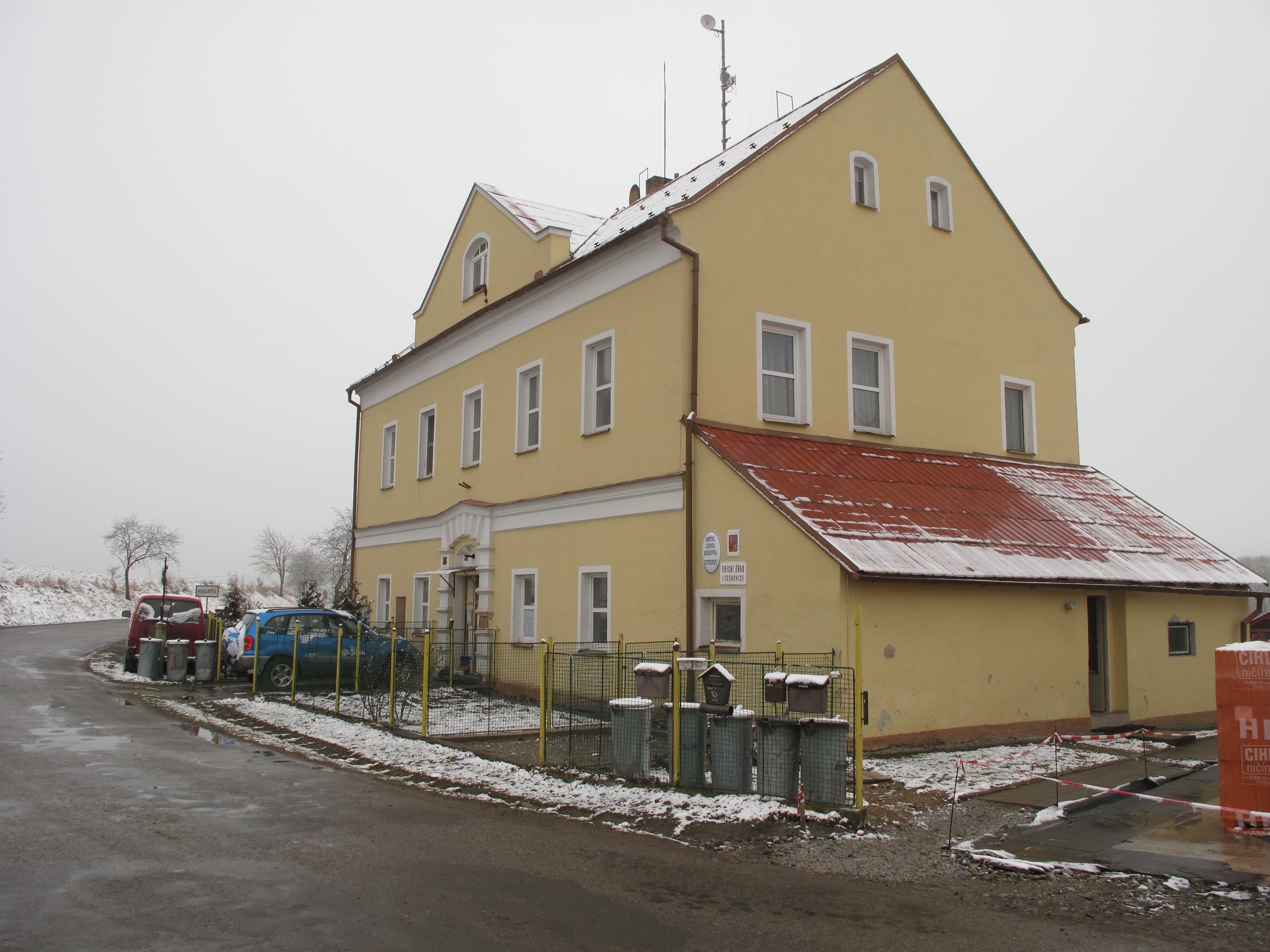 Obecní úřad v Neuslužicích. Okres Strakonice, Česká republika.